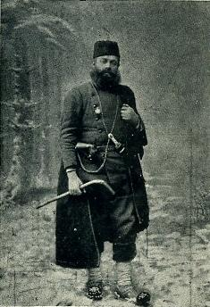 Бугарскиот офицер и македонски револуцинер Анастас Jанков (1857-1906). Преземено од бугарската Википедиjа.